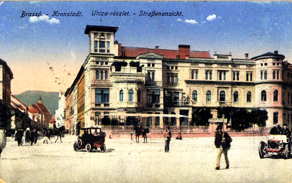 Vila Kertsch Brasov